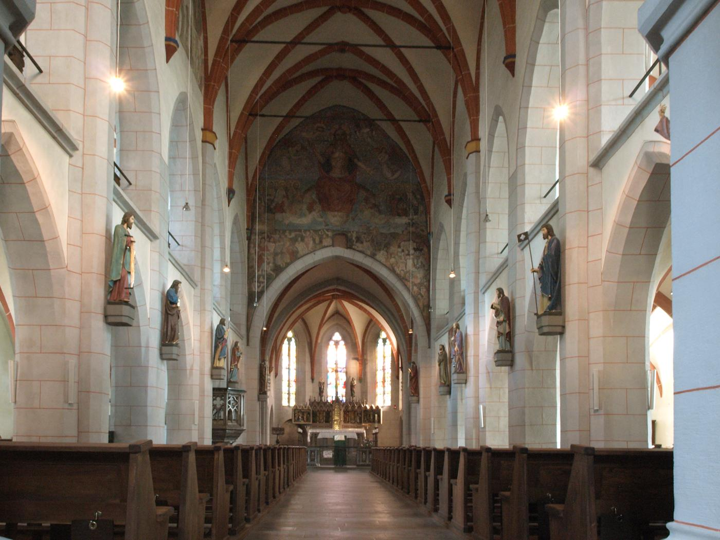 Montabaur, St. Peter in Ketten, innen Foto 2013